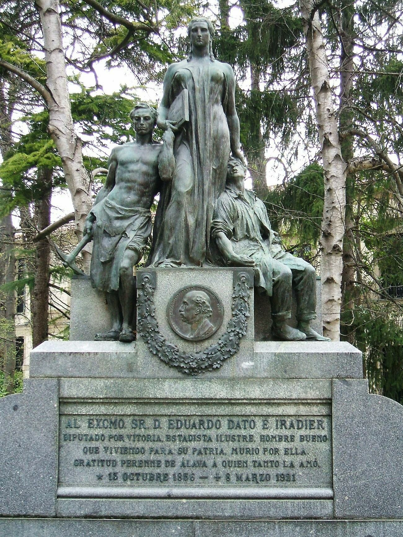 Monumento a Eduardo Dato, Parque de la Florida, Vitoria-Gasteiz, País Vasco, España/Spain